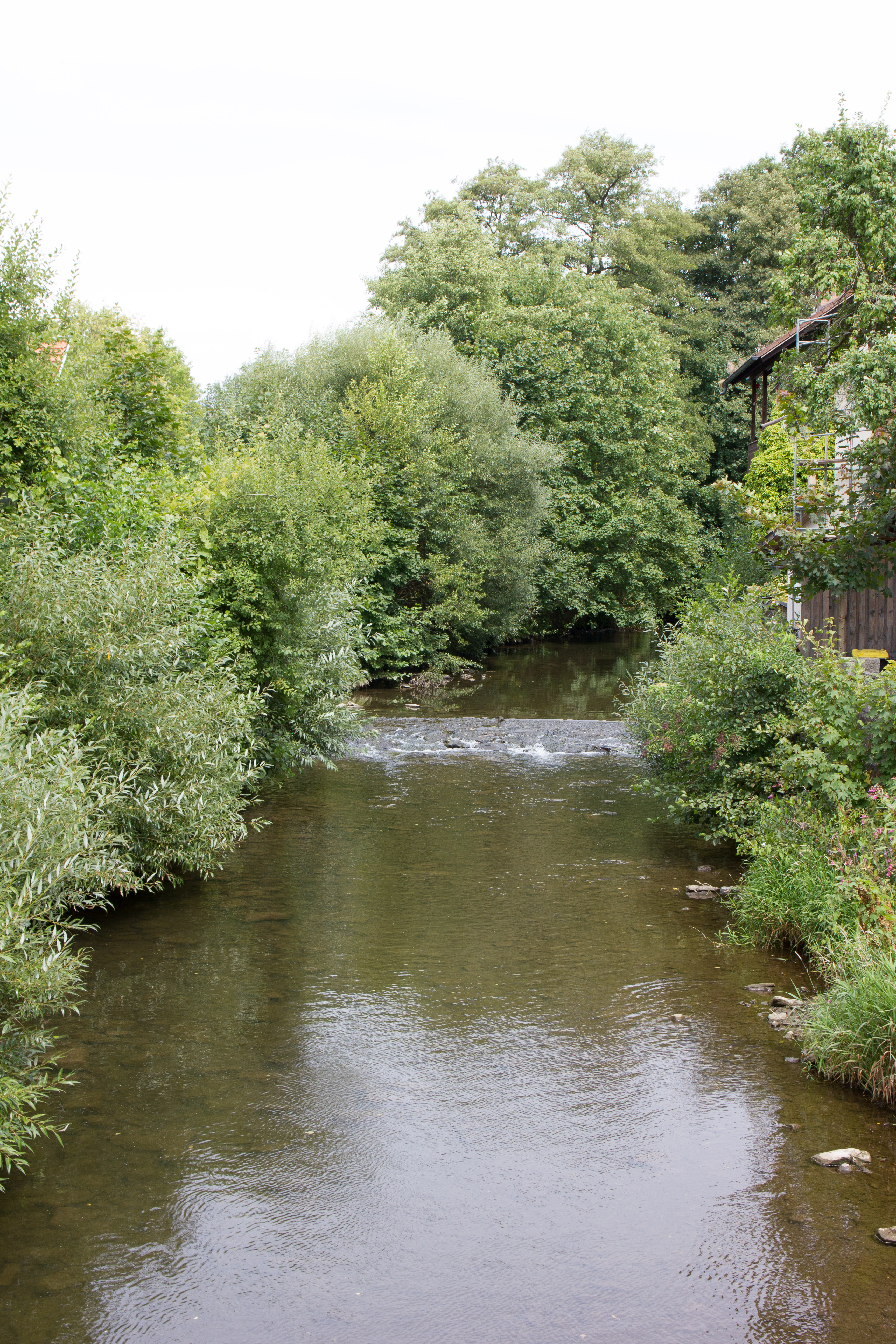 Blick auf die Kronach von der Kaulangerbrücke in Kronach